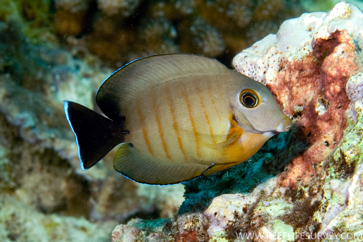 Acanthurus tristis en Banda Aceh, Indonesia